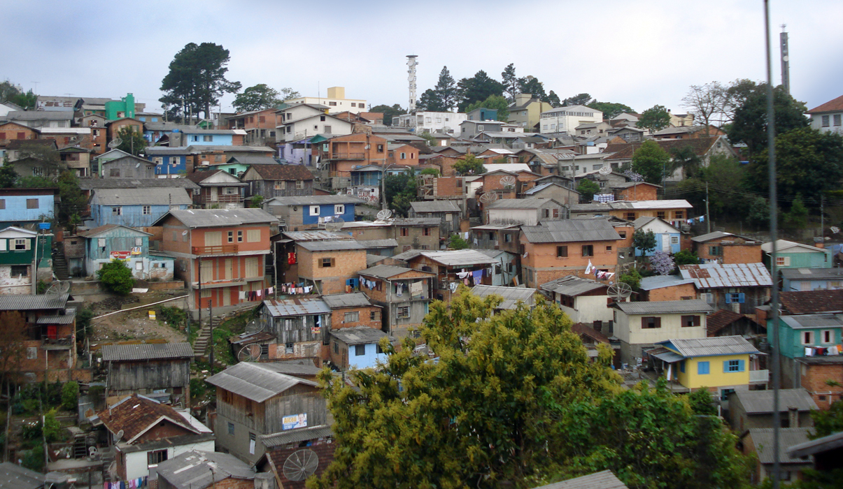 Favela em Caxias do Sul, o chamado "Buraco Quente"